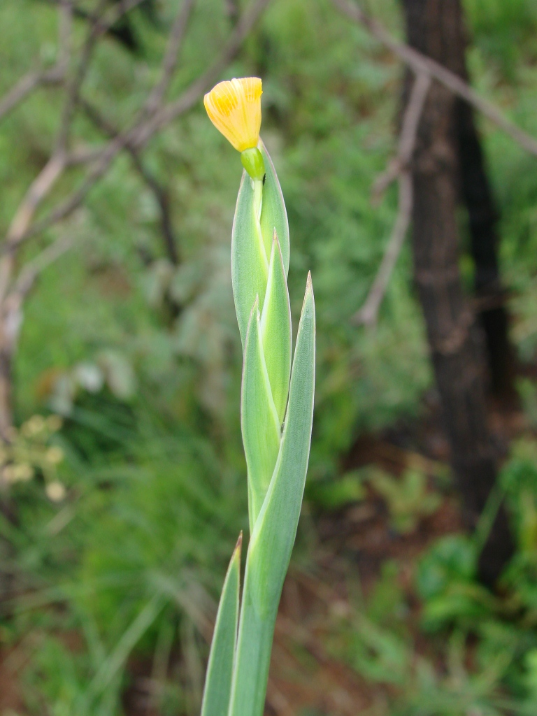 Sisyrinchium vaginatum Spreng. - IRIDACEAE - Jardim Botânico de Brasília - Brasília - Distrito Federal - Brasil.